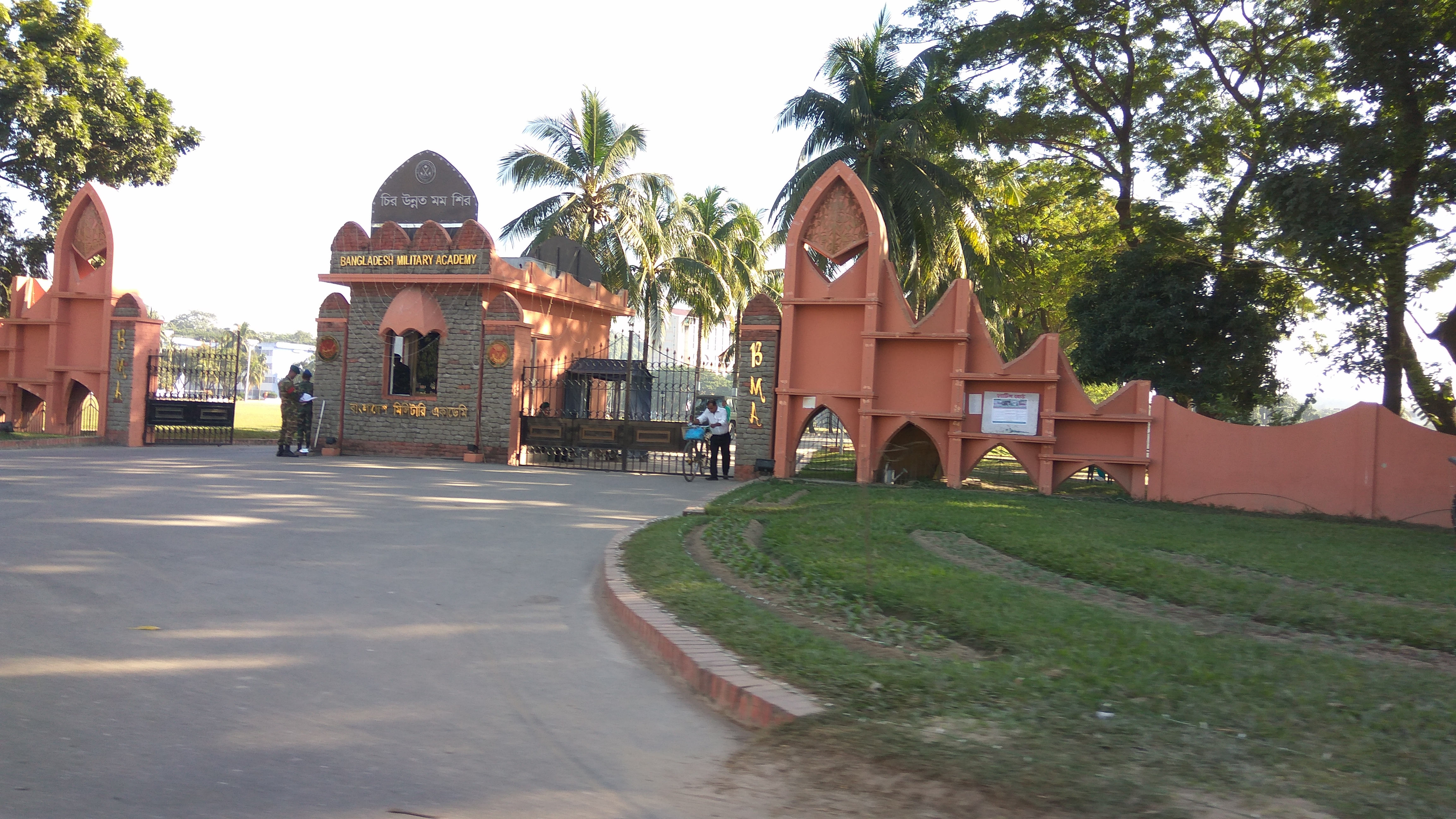 বাংলাদেশ মিলিটারি একাডেমী, ভাটিয়ারী, চট্টগ্রাম